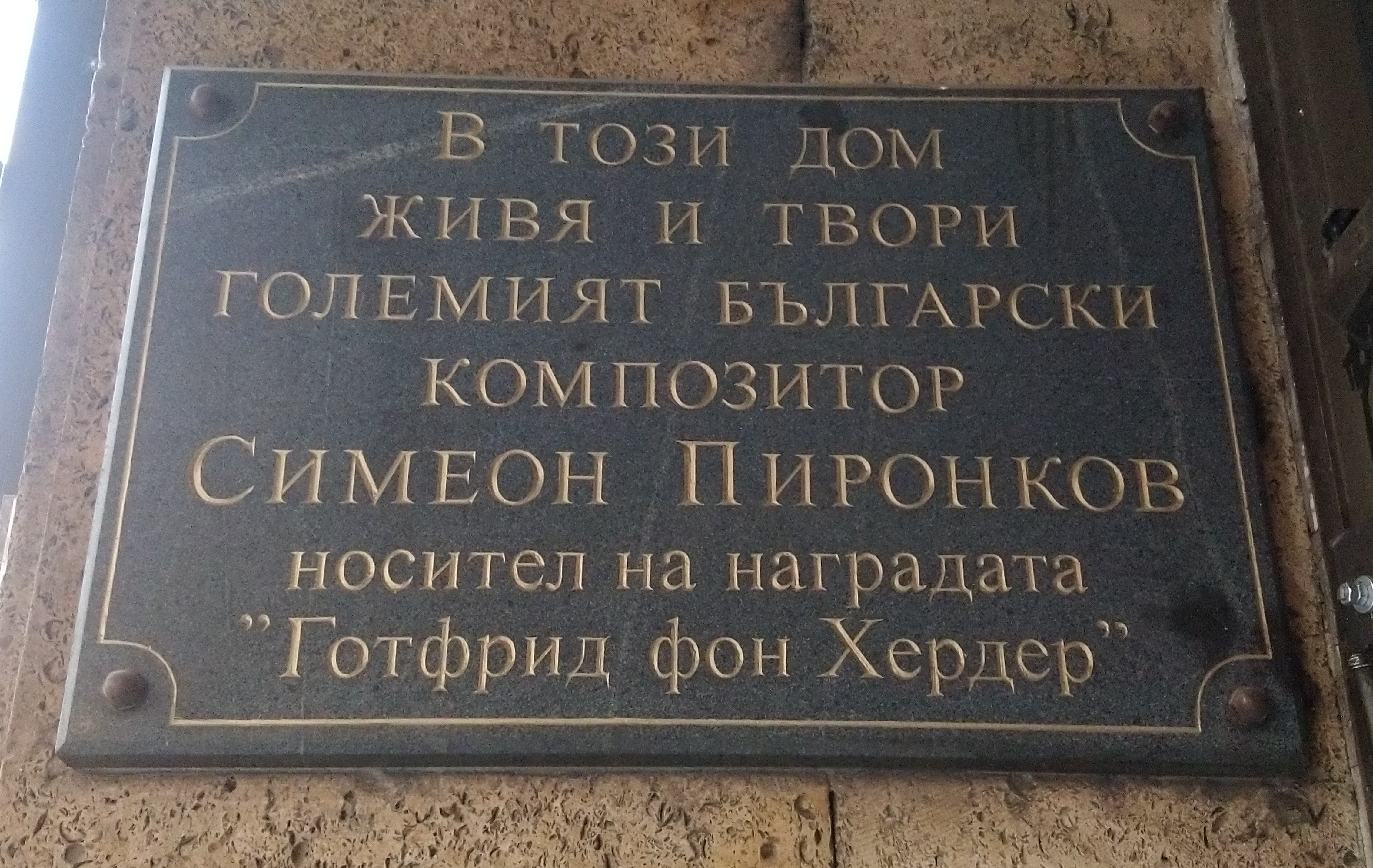 Паметна плоча на композитора Симеон Пиронков, бул. Витоша 56, София